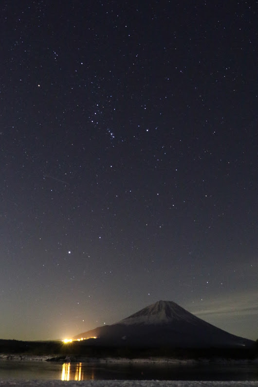 精進湖からの星空